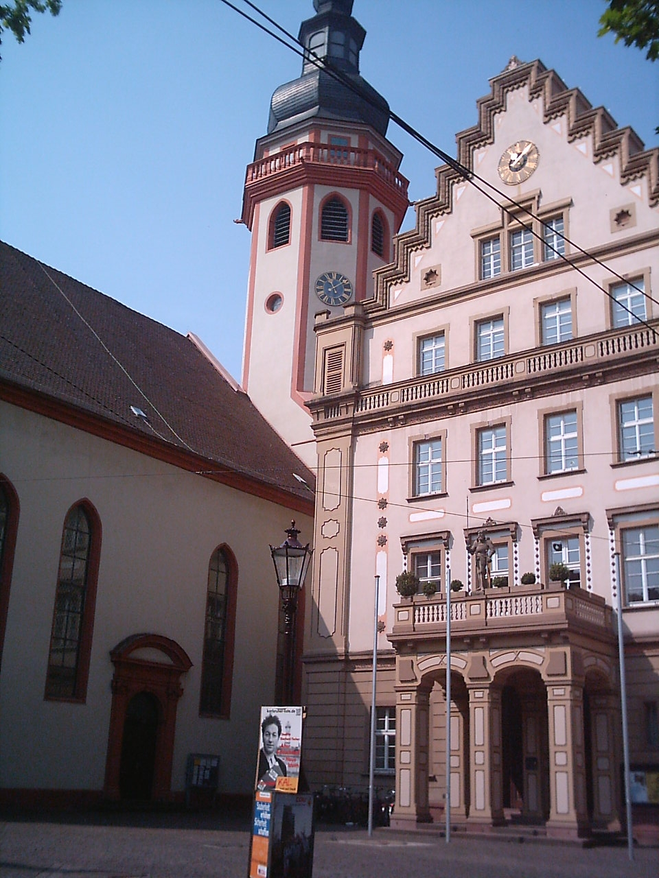 Durlach Marktplatz mit Rathaus und evangelischer Stadtkirche